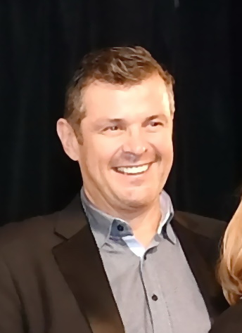 Christian K. Schaeffer bei der Verleihung des Bayerischen Poetentalers an „Die Rosenheim-Cops“